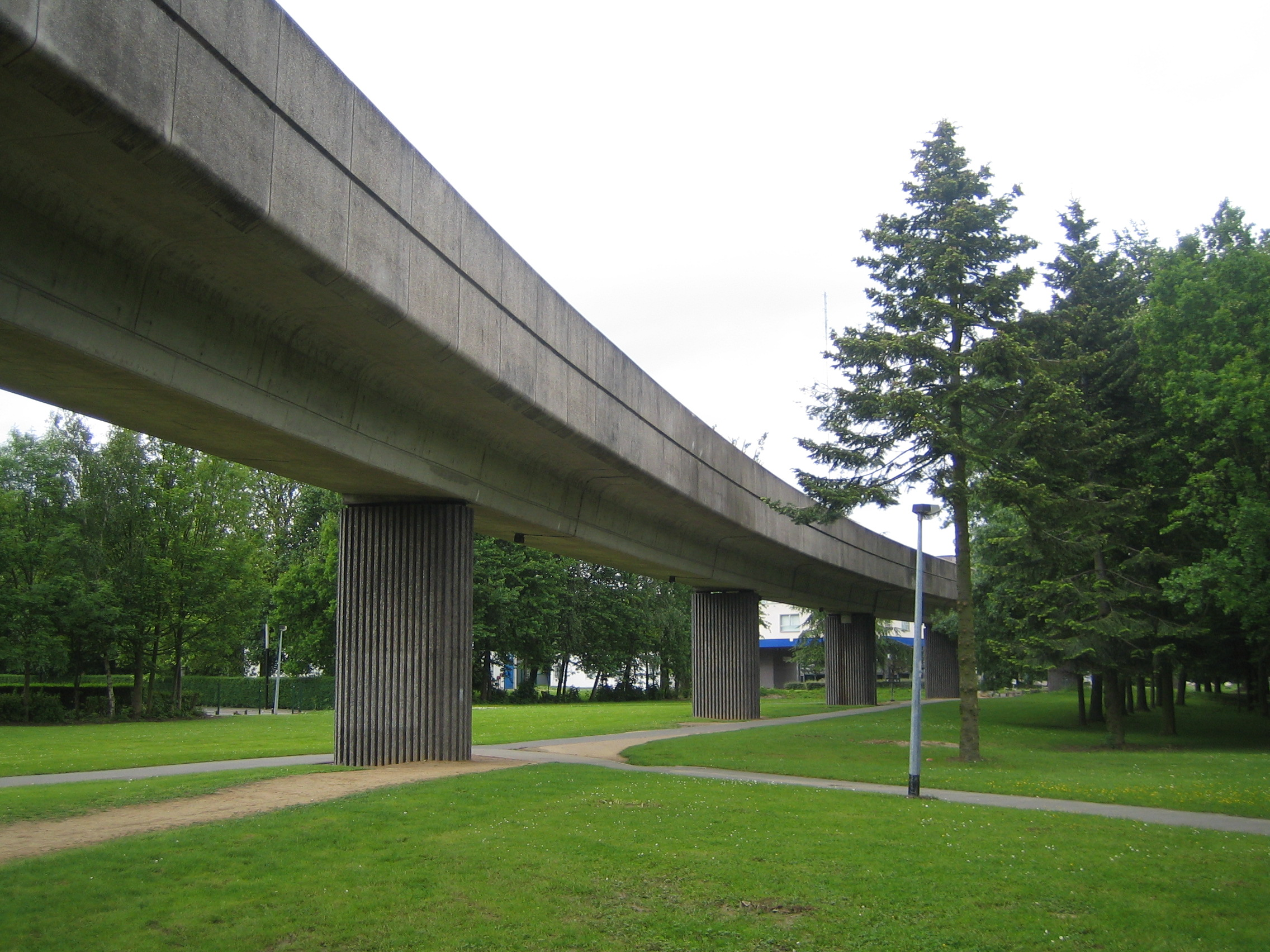 Métro entre les stations Quatre Cantons et Cité Scientifique, Villeneuve d'Ascq